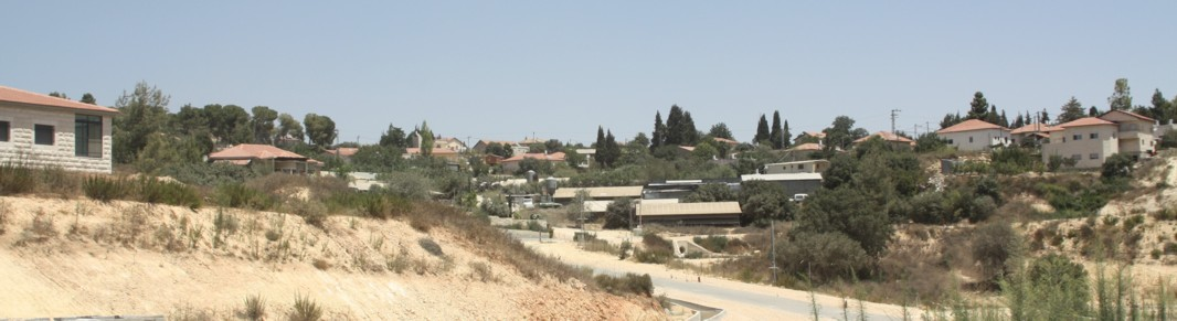 נס הרים Nes Harim